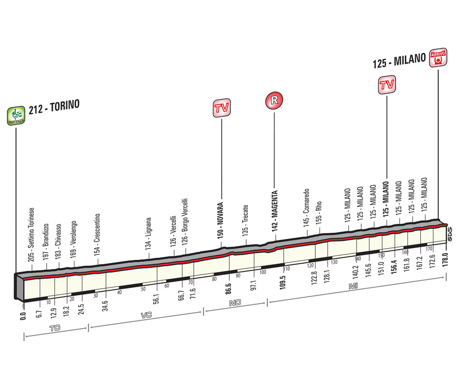 Tappa 21 Giro 2015